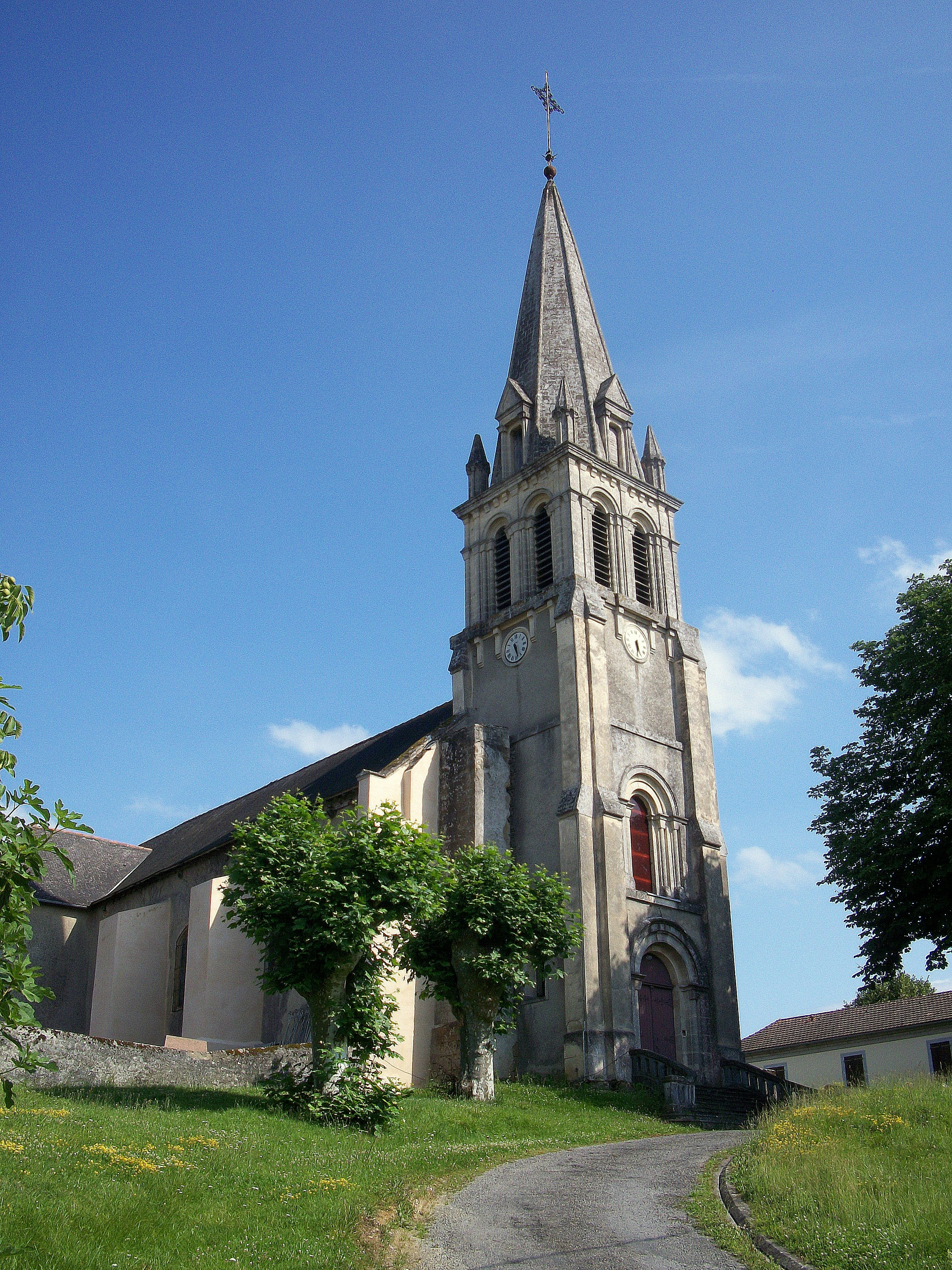 Église d'Orleix, Hautes-Pyrénées, France